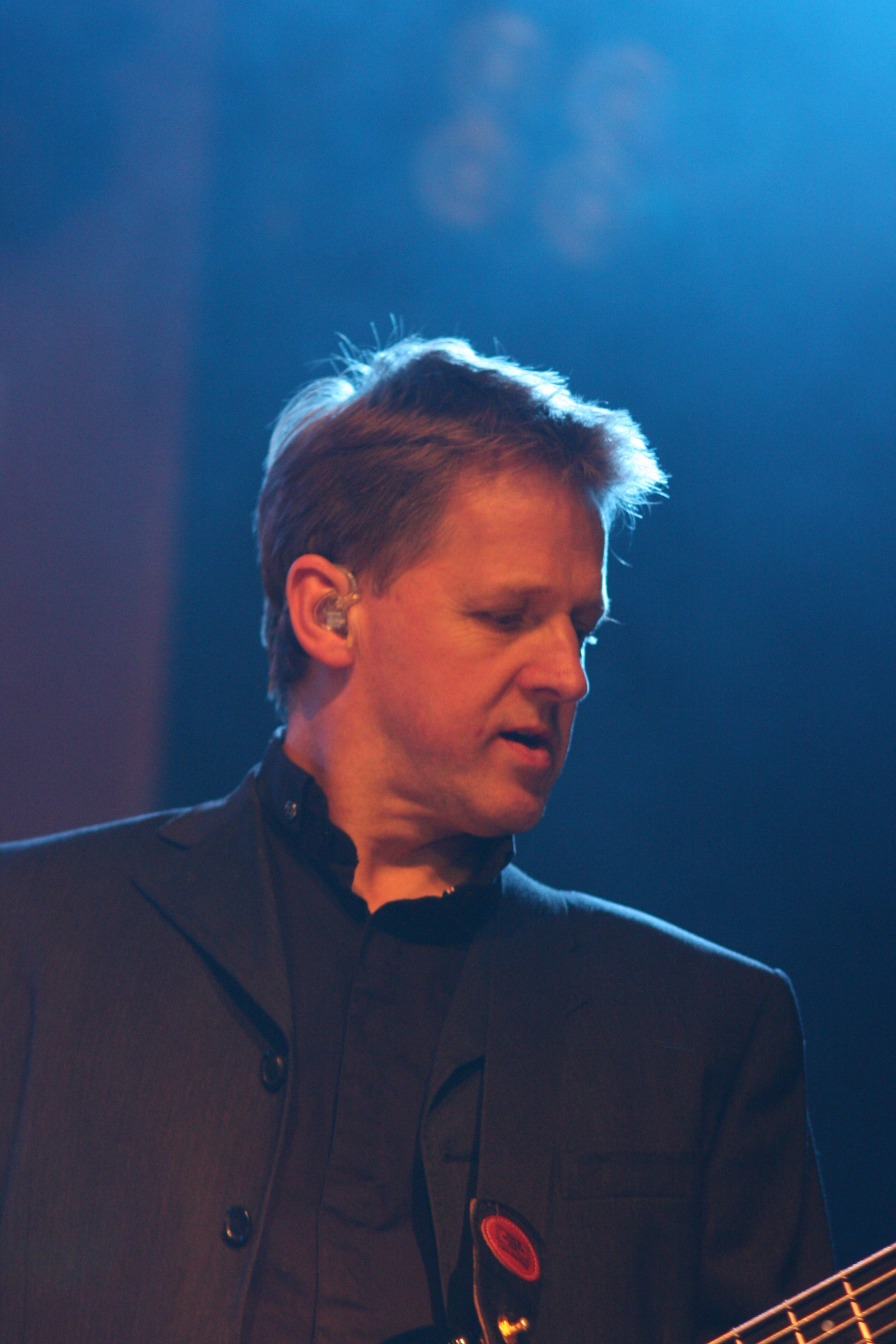 Wiesbadener Stadtfest 2013: Anthony Drennan von Mike & the Mechanics